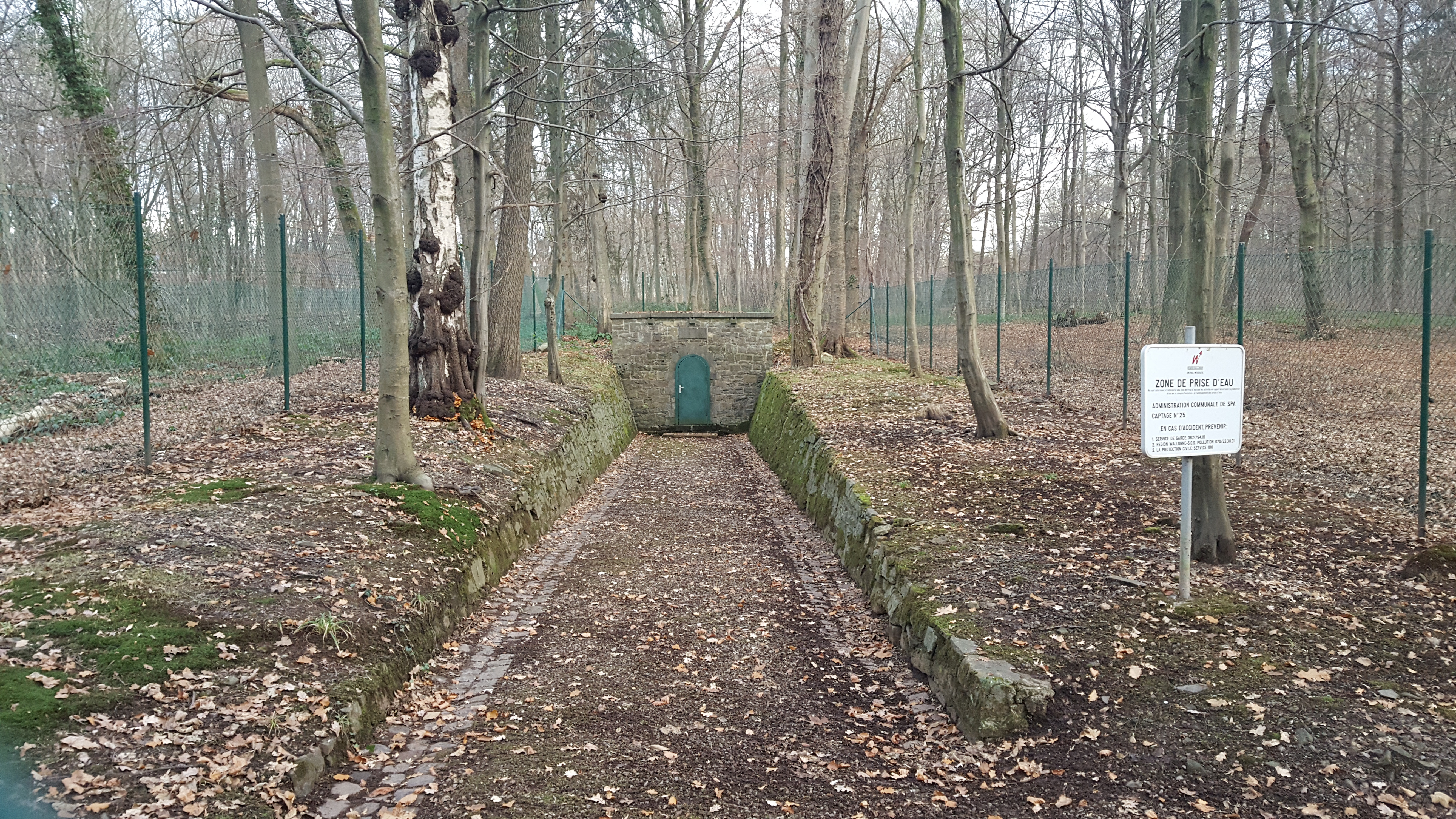 Source Marie-Henriette, Spa, Belgique